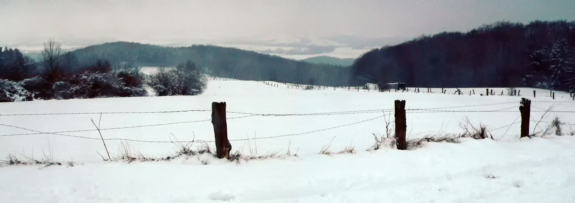 Winterlandschaft bei Goldbeck (Rinteln), mit Blick auf Almena